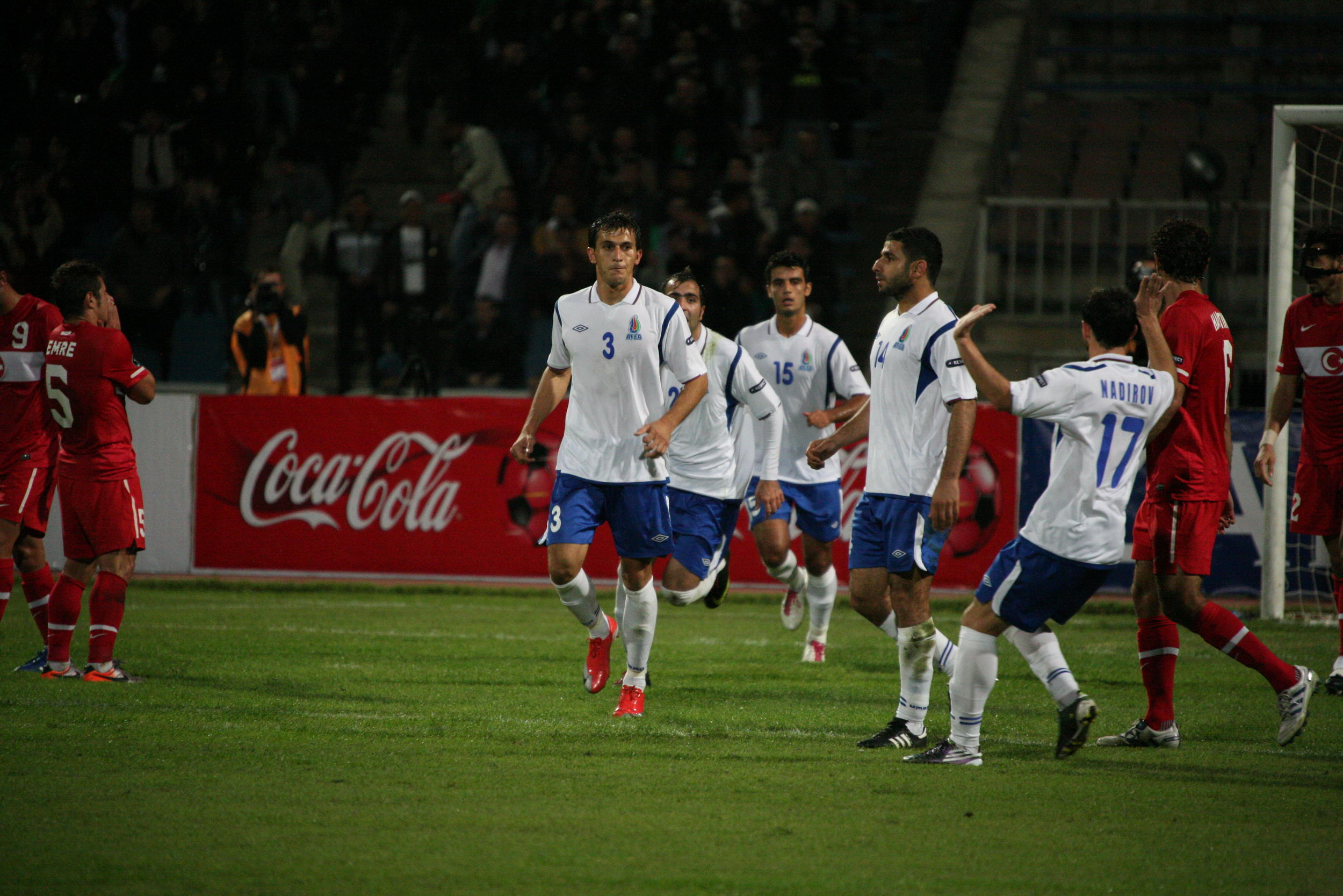 Azərbaycan-Türkiyə oyunu